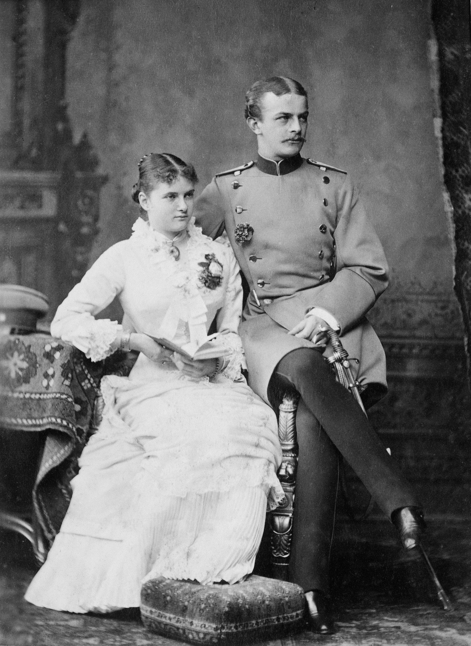 Graf Friedrich von Hohenau und seine Braut Charlotte von der Decken vor der Verlobung im Jahr 1880. Hochzeit am 21.06.1881 in Barbisdorf bei Dresden.